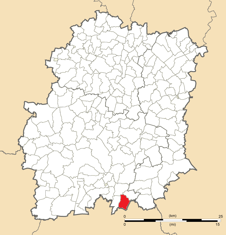 Carte de position de Brouy en Essonne (91)